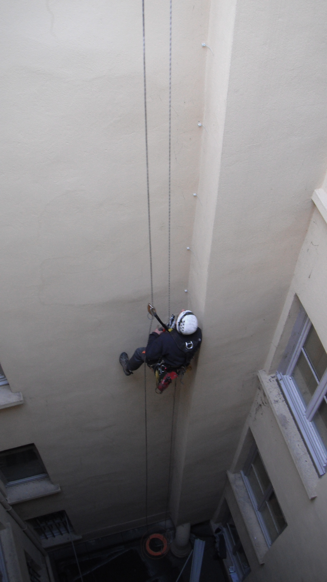 cordiste installant des colliers de serrage pour passage de câble électrique